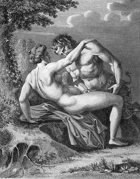 Agostino Carracci (1557 - 1602), Satyr et Nymphe